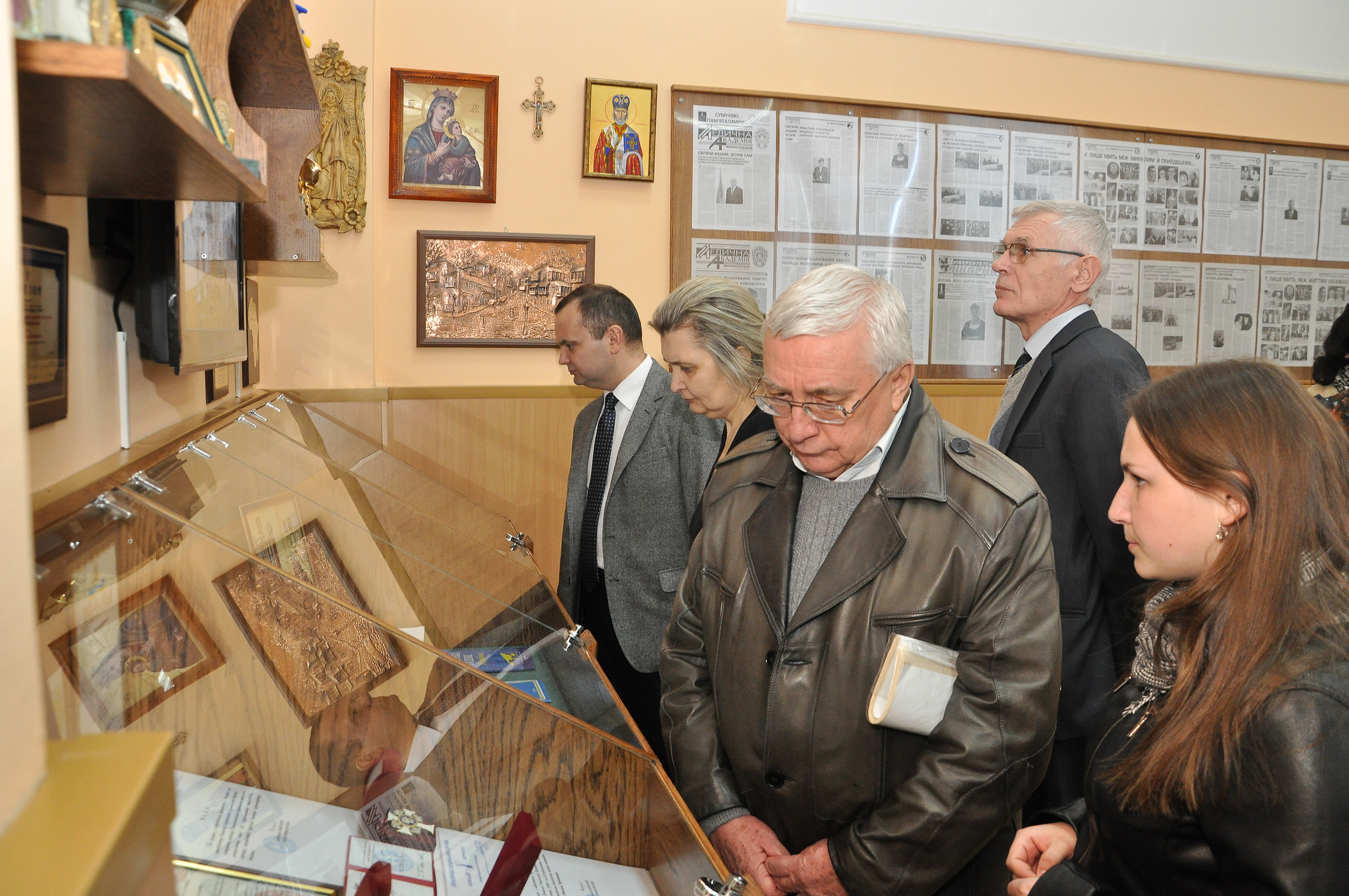 Відкриття Музею Леоніда Якимовича Ковальчука в Тернопільському державному медичному університеті імені І. Я. Горбачевського.